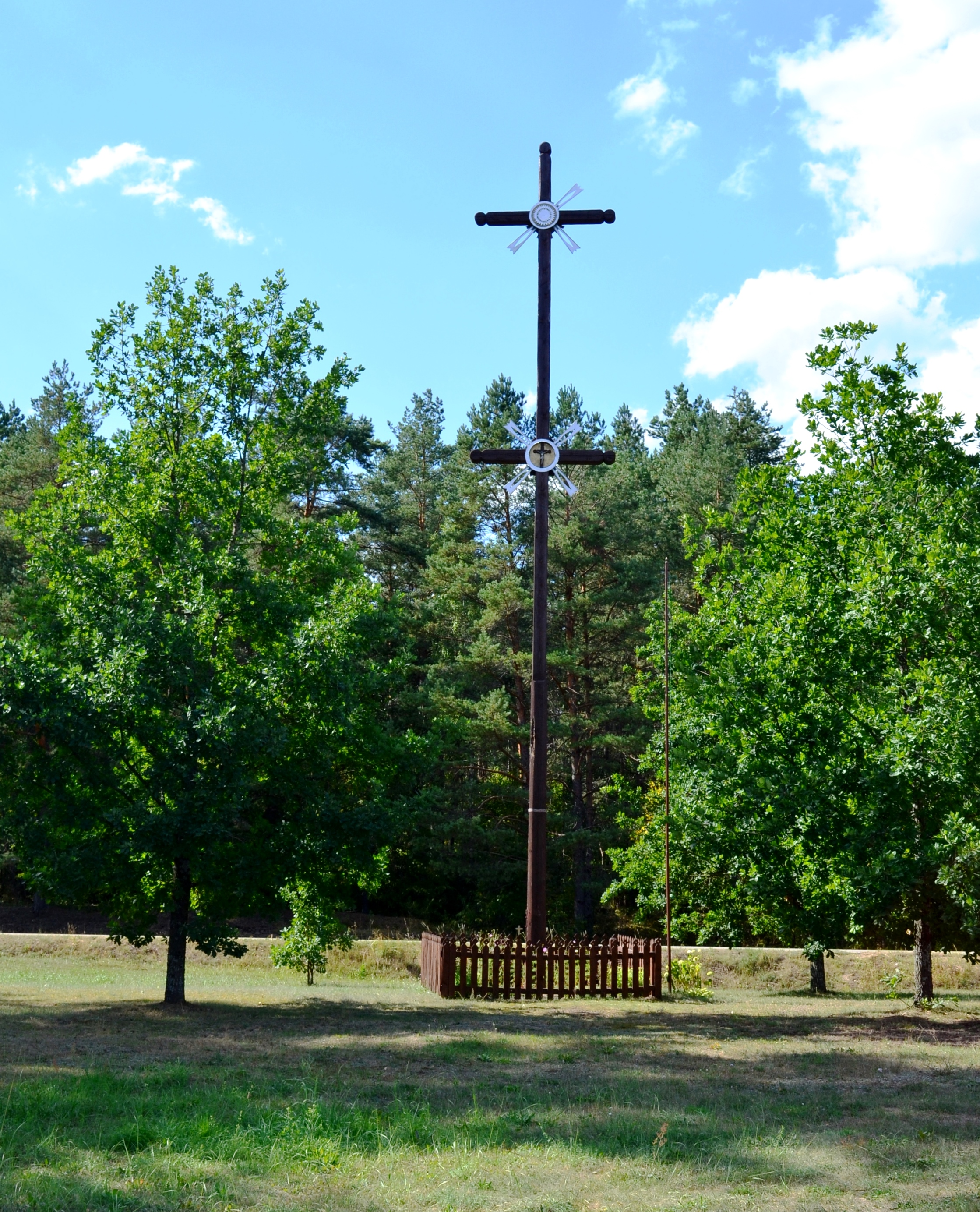 Kryžius, Margionys, Varėnos r.